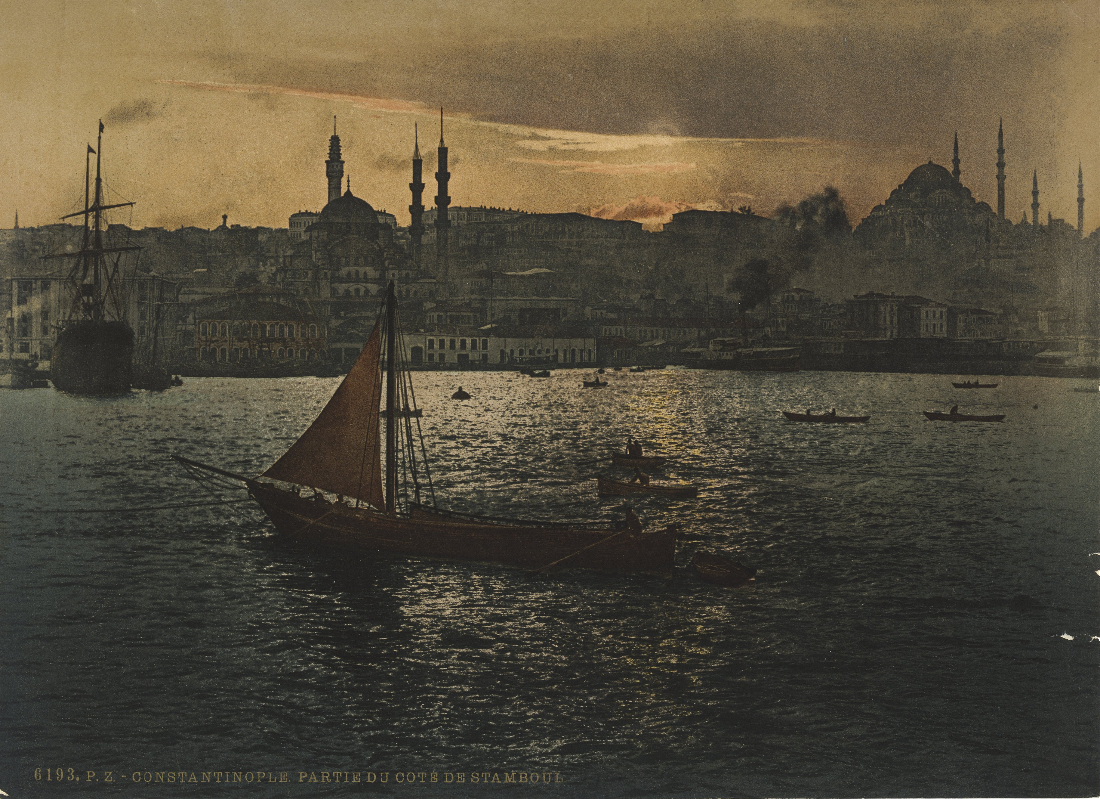 Constantinople, partie du coté de Stamboul